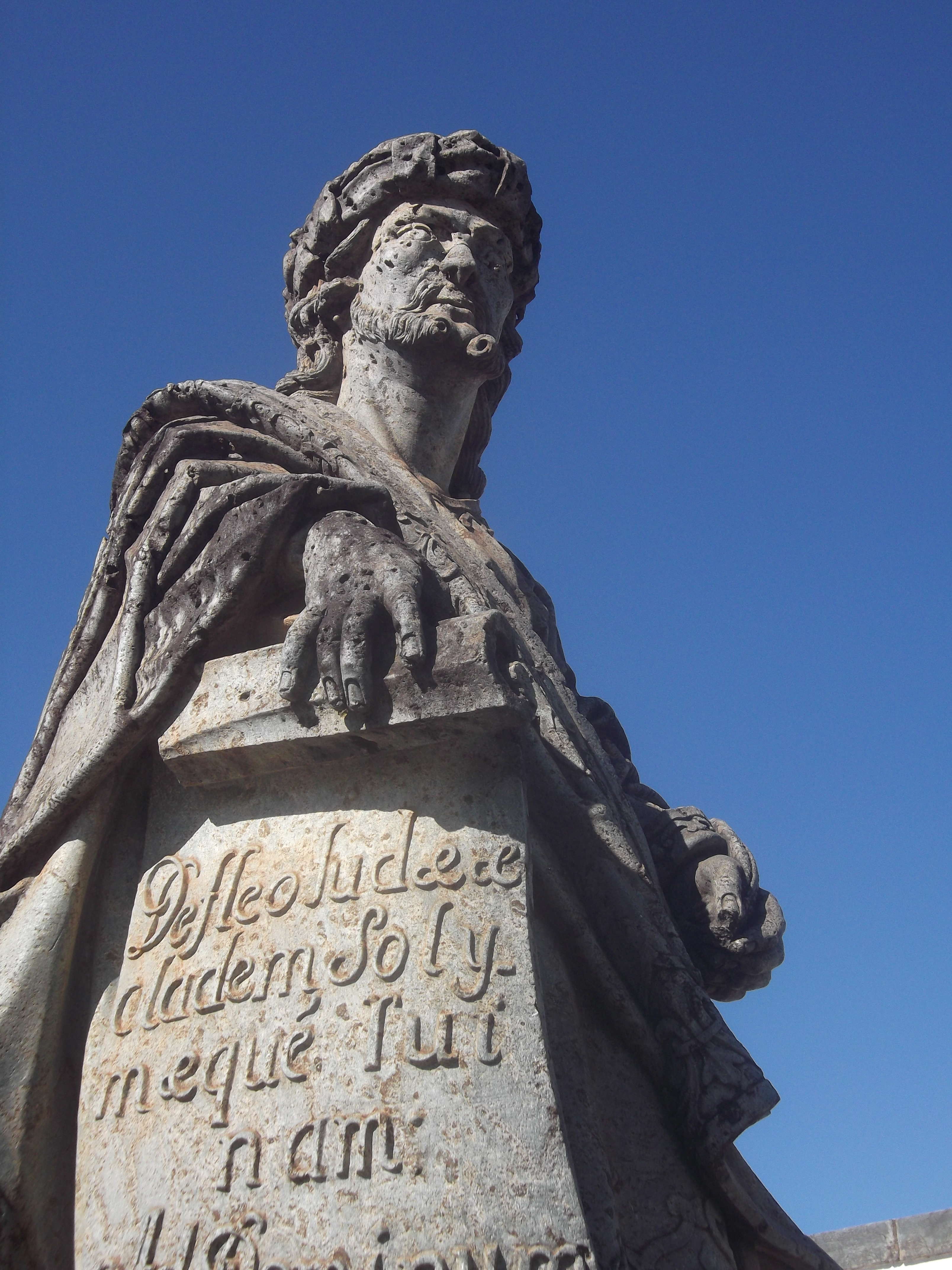 Statues in Santuário do Bom Jesus de Matosinhos